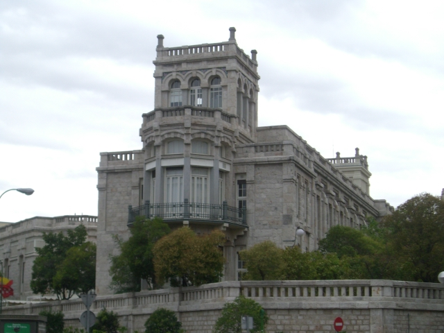 Dependencias adyacentes del Hospital de Jornaleros, también conocido como Hospital de Maudes.